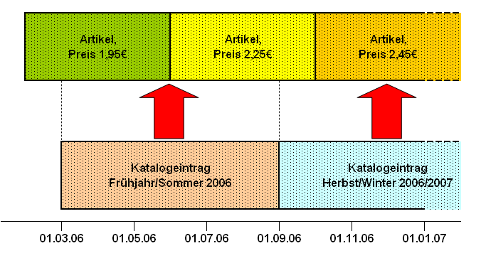 Temporale Datenhaltung, Erläuterung der referentiellen Integrität unter Berücksichtigung temporaler Abhängigkeiten.